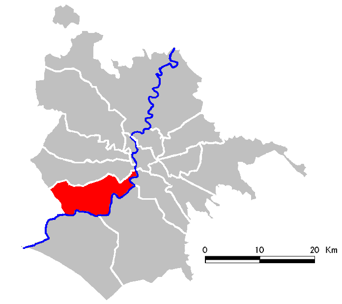 Municipio Roma XI